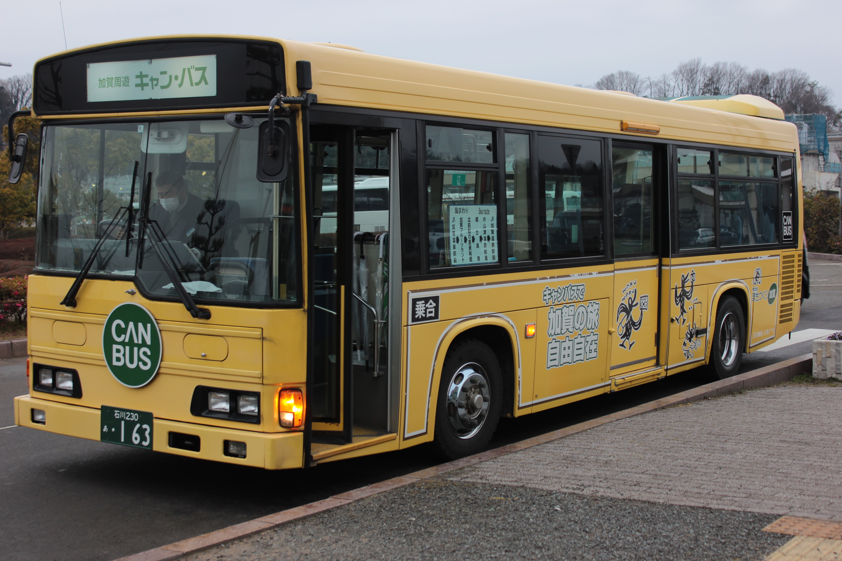 加賀周遊バス キャン・バス（日野・レインボーHR、加賀温泉駅前にて撮影） Canon EOS Kiss X5